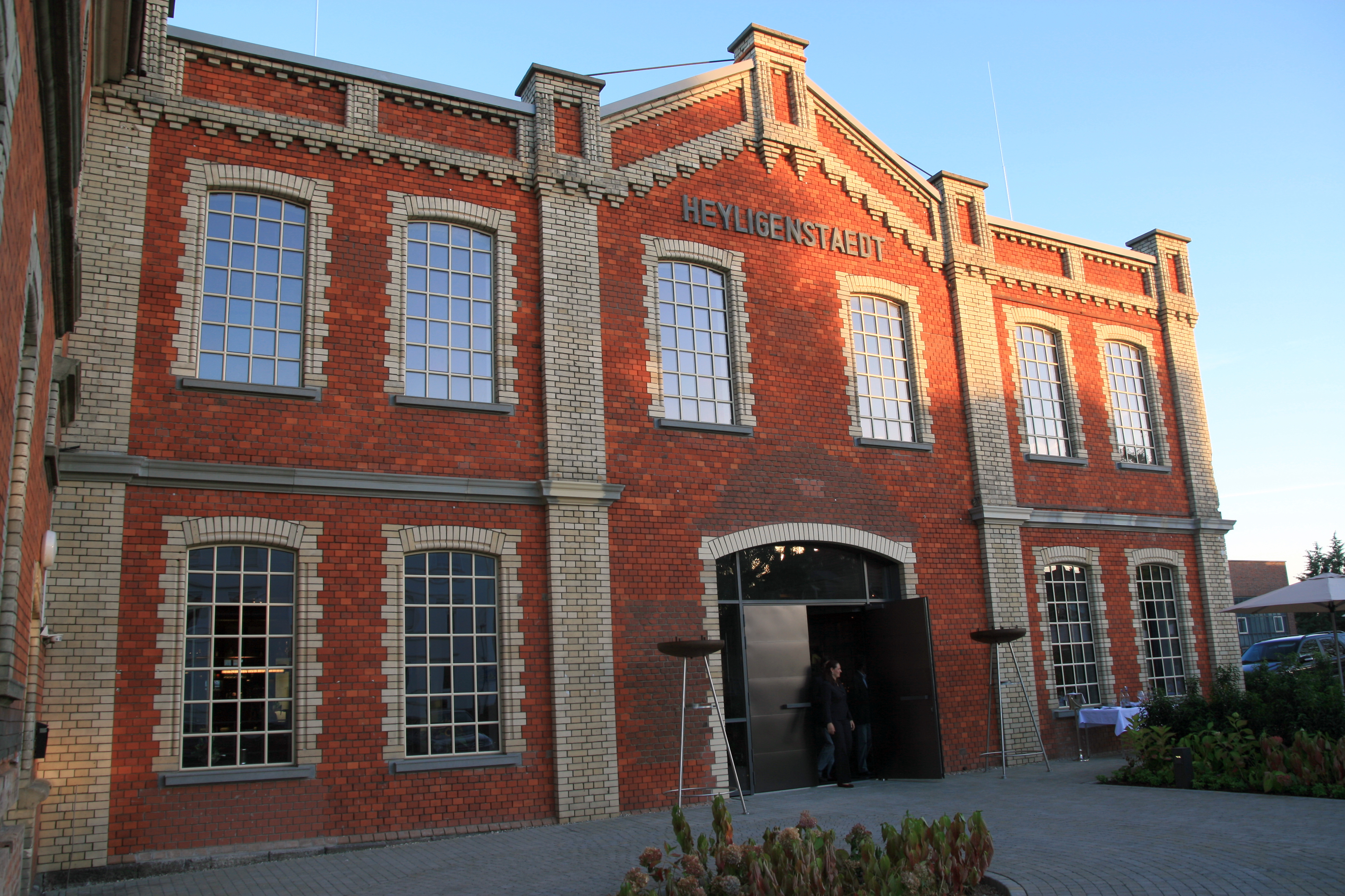 Restaurant Heyligenstaedt, ehemaliges Verwaltunggebäude und Hauptbau der Werkzeugmaschinenfabrik Heyligen­staedt (heute dahinter angesiedelt)